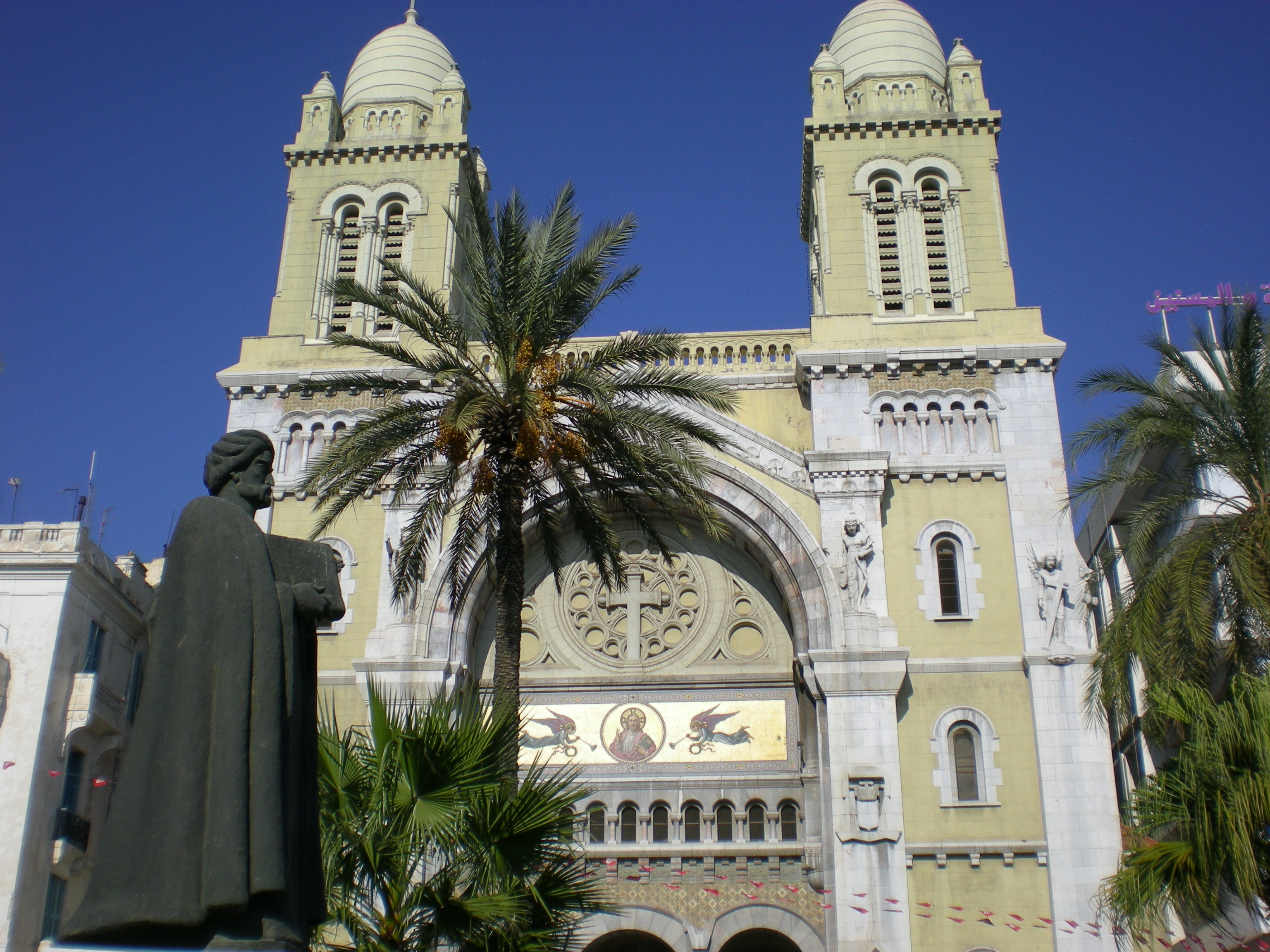 Cathédrale Saint-Vincent-de-Paul et statue d'Ibn Khaldoun ev avant plan, Tunis